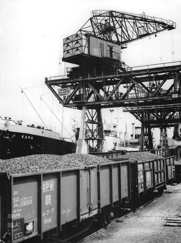 Rostock, Überseehafen, Frachter, Güterzug, Verladekran Zentralbild Spremberg 26.6.1965 Der griechische Frachter "Kapa" löscht Erz im alten Rostocker Hafen. Hier werden vor allem kleinere Frachtschiffe der verschiedenen Länder abgefertigt. Für viele Besucher der diesjährigen Ostseewoche, die in wenigen Tagen beginnt, wird der alte Rostocker Hafen erneut Anziehungspunkt sein.